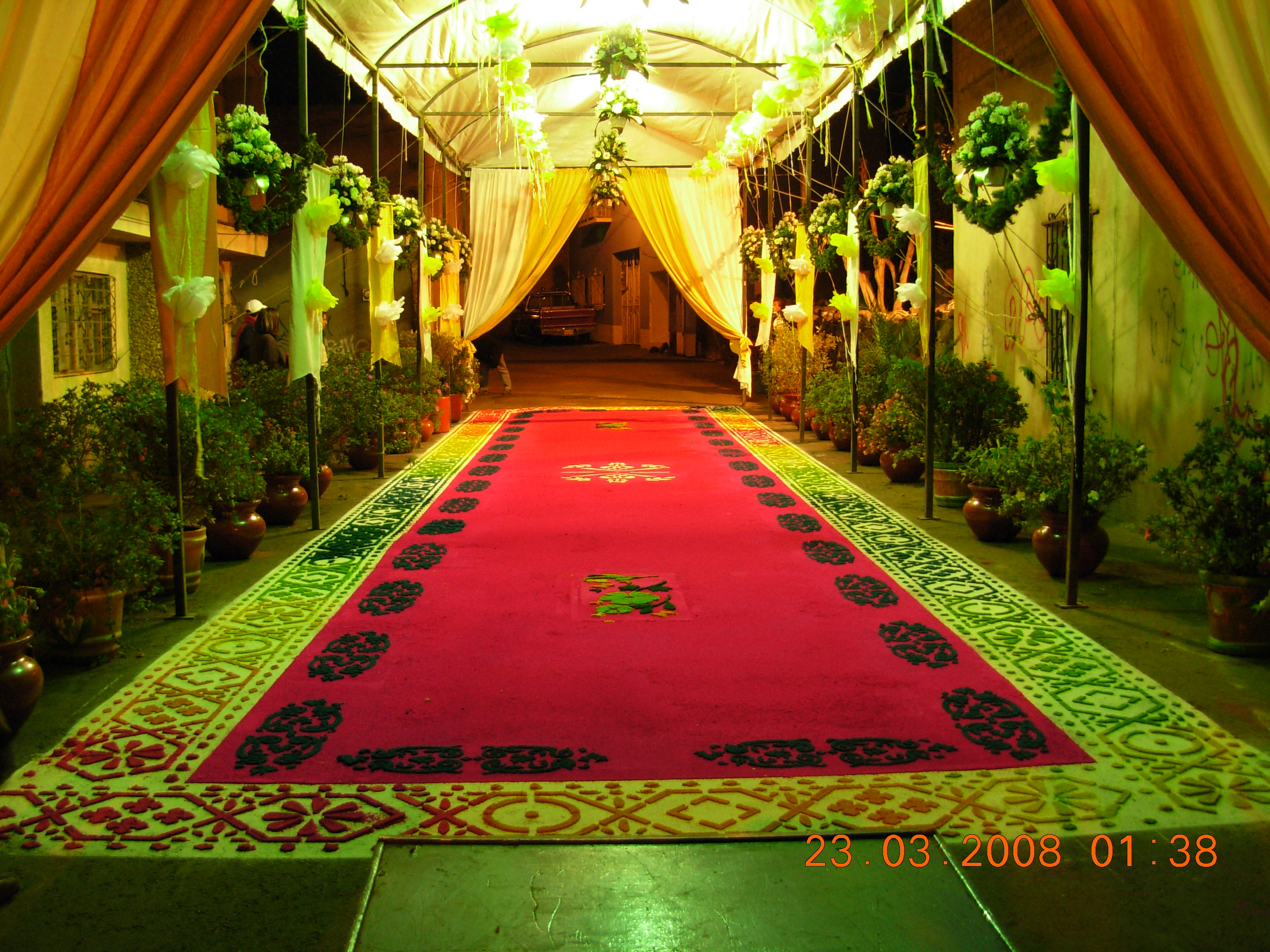 Tapete de aserrín en la calle 20 de Noviembre, en San Juan Ixtayopan.